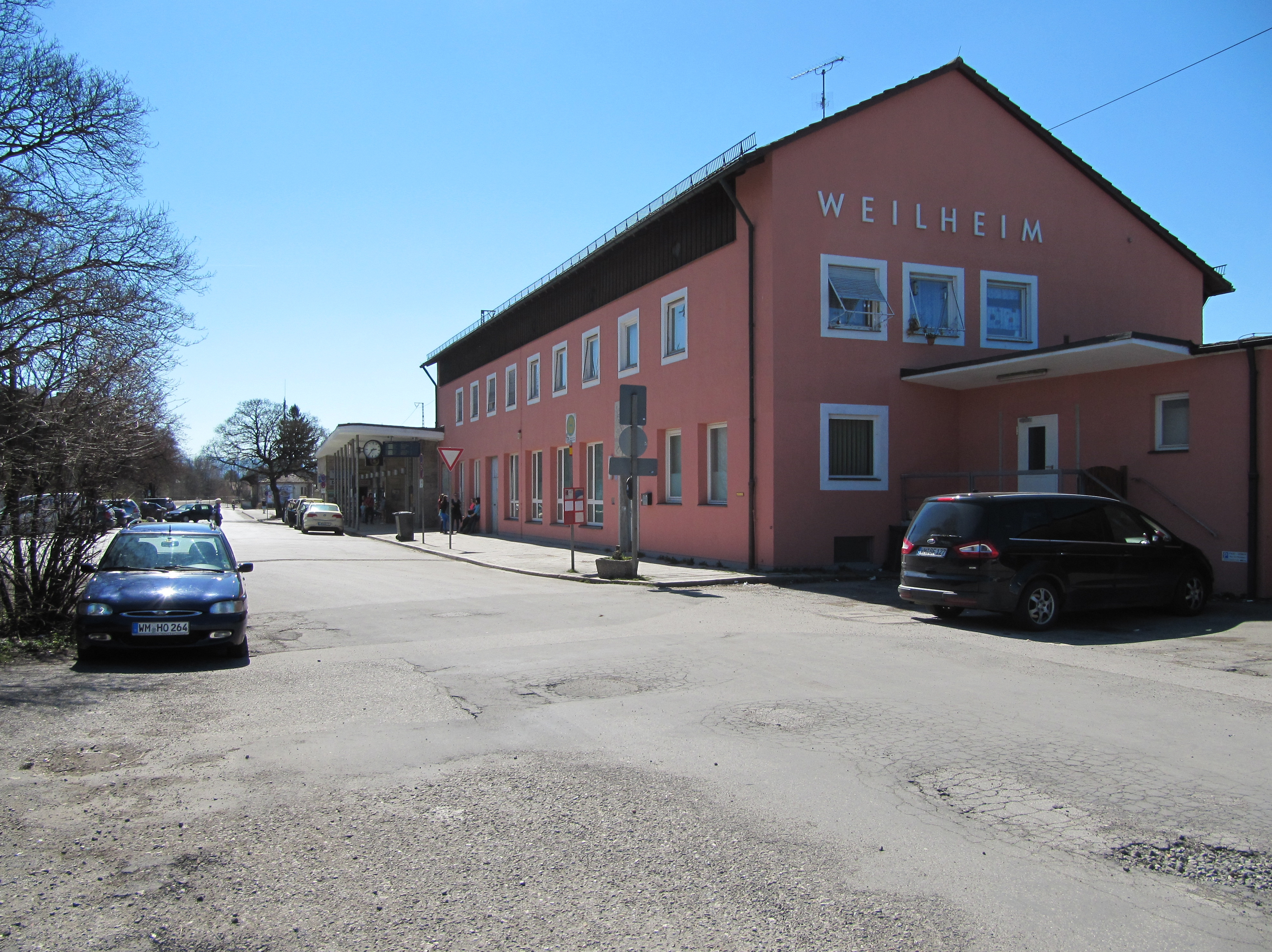 Bahnhof Weilheim: Bahnhofsgebäude von Nord